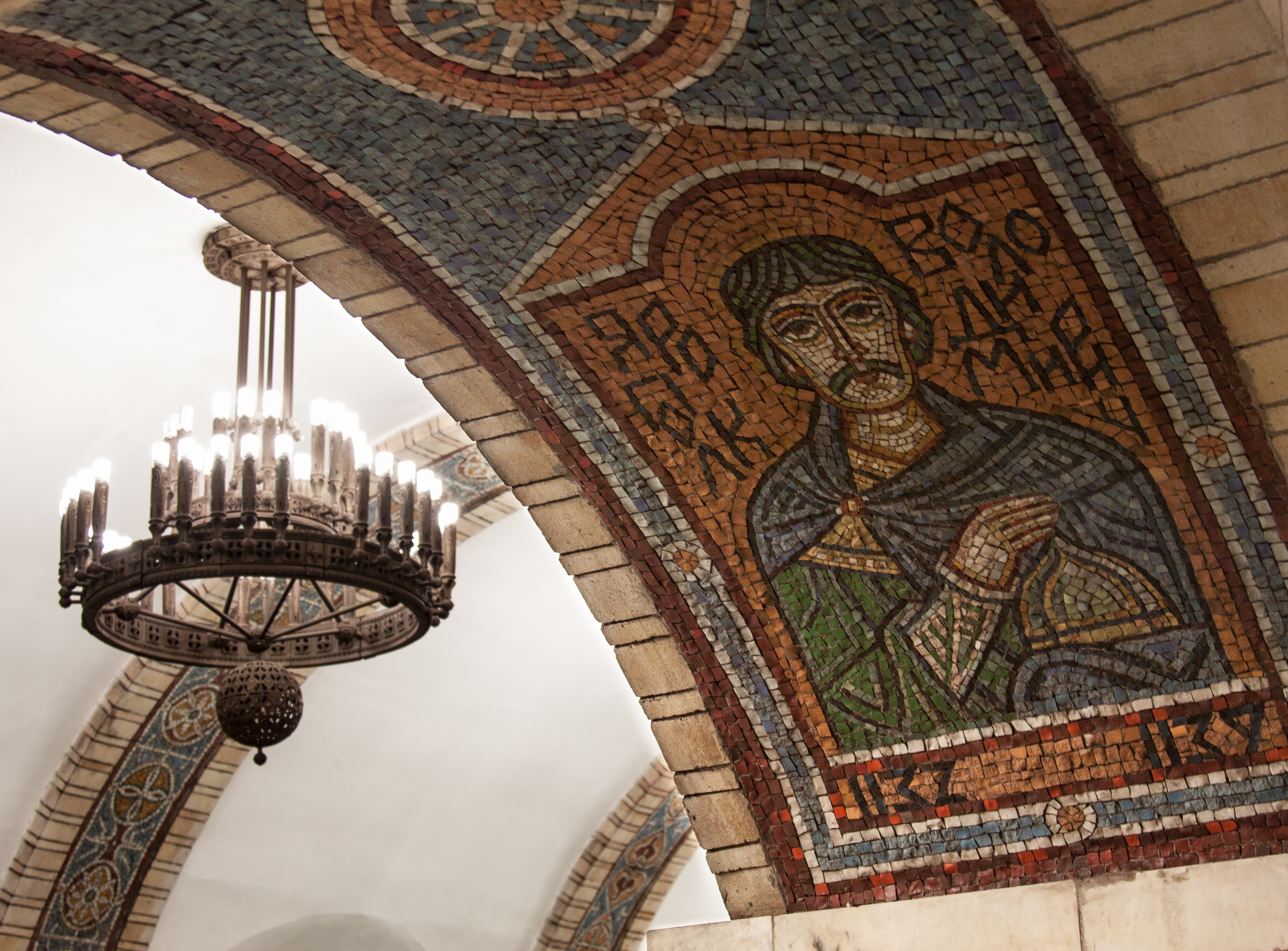 Киев, Метро, Станция "Золотые Ворота"